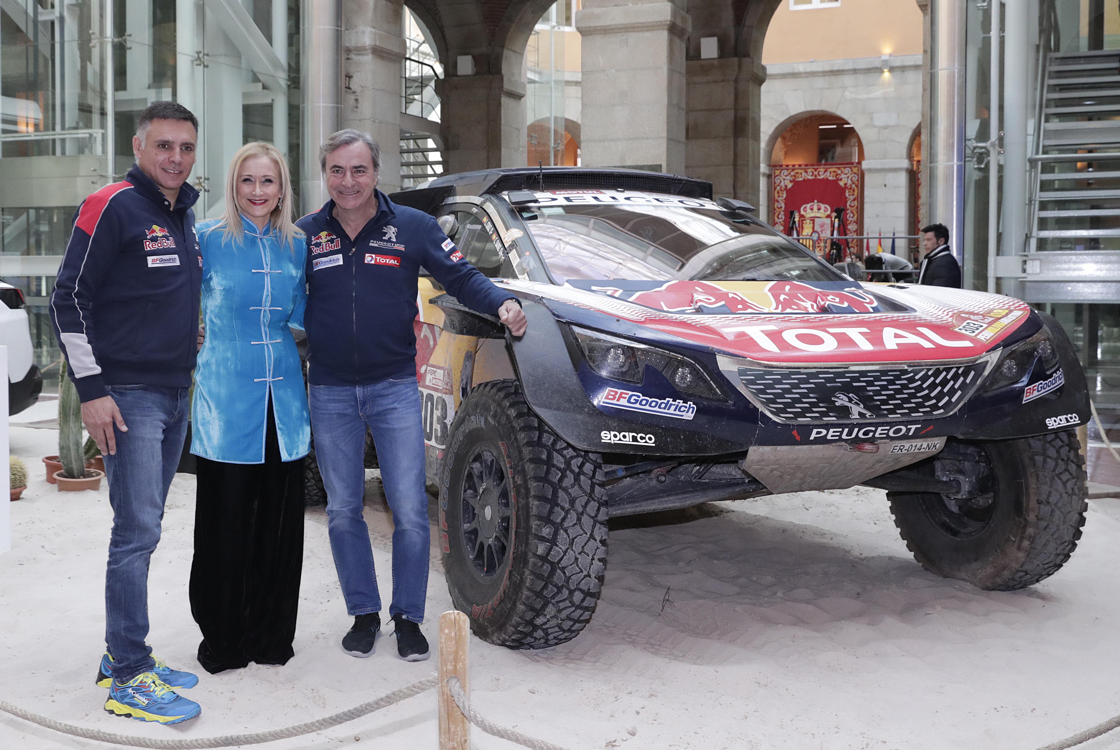 Hoy rendimos un merecido homenaje a Carlos Sainz y Lucas Cruz , ganadores del durísimo Dakar 2018 y dos figuras extraordinarias del mundo del motor. La victoria en el Dakar 2018 es una magnífica ocasión para darnos cuenta de lo lejos que pueden llegar un madrileño y un catalán, trabajando en equipo. Carlos Sainz y Lucas Cruz son un ejemplo y representan los mejores valores del deporte.